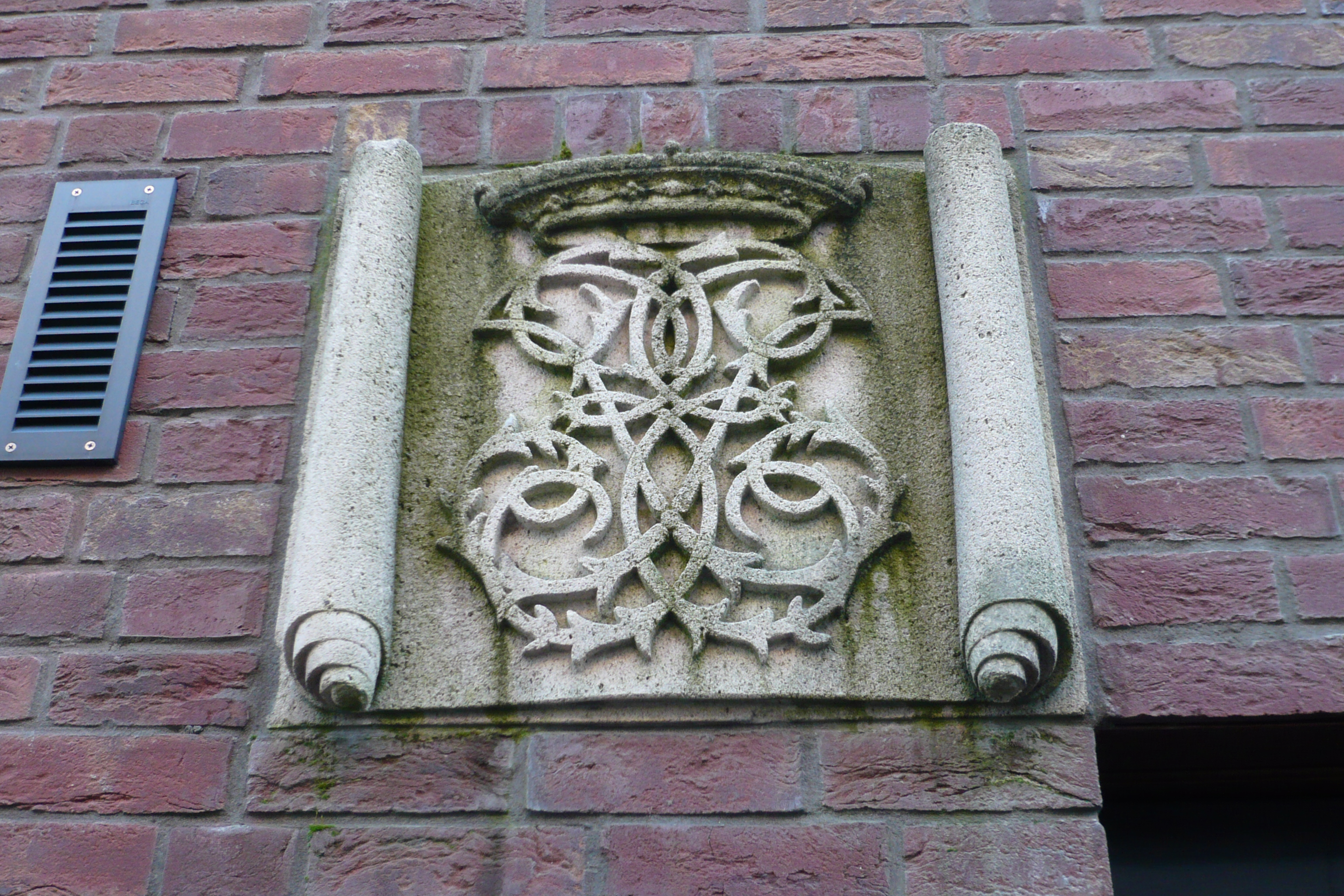 Johannes Enschede Hof, Korte Begijnestraat, Haarlem Enschede logo